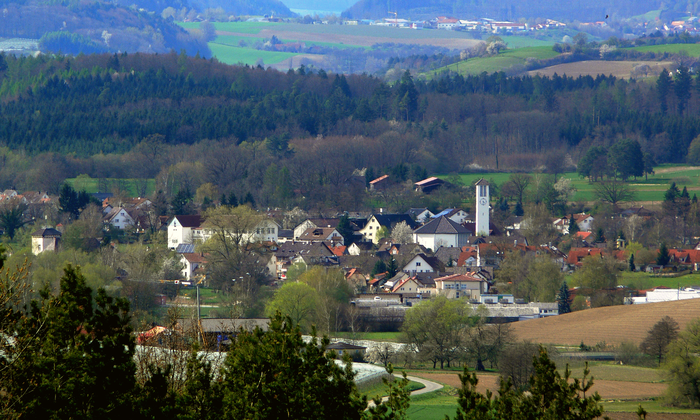 Blick von der Wallfahrtskirche Baitenhausen (Stadt Meersburg), Bodenseekreis in Richtung Untersiggingen (Ortsteil von Deggenhausertal) mit Pfarrkirche Maria Königin